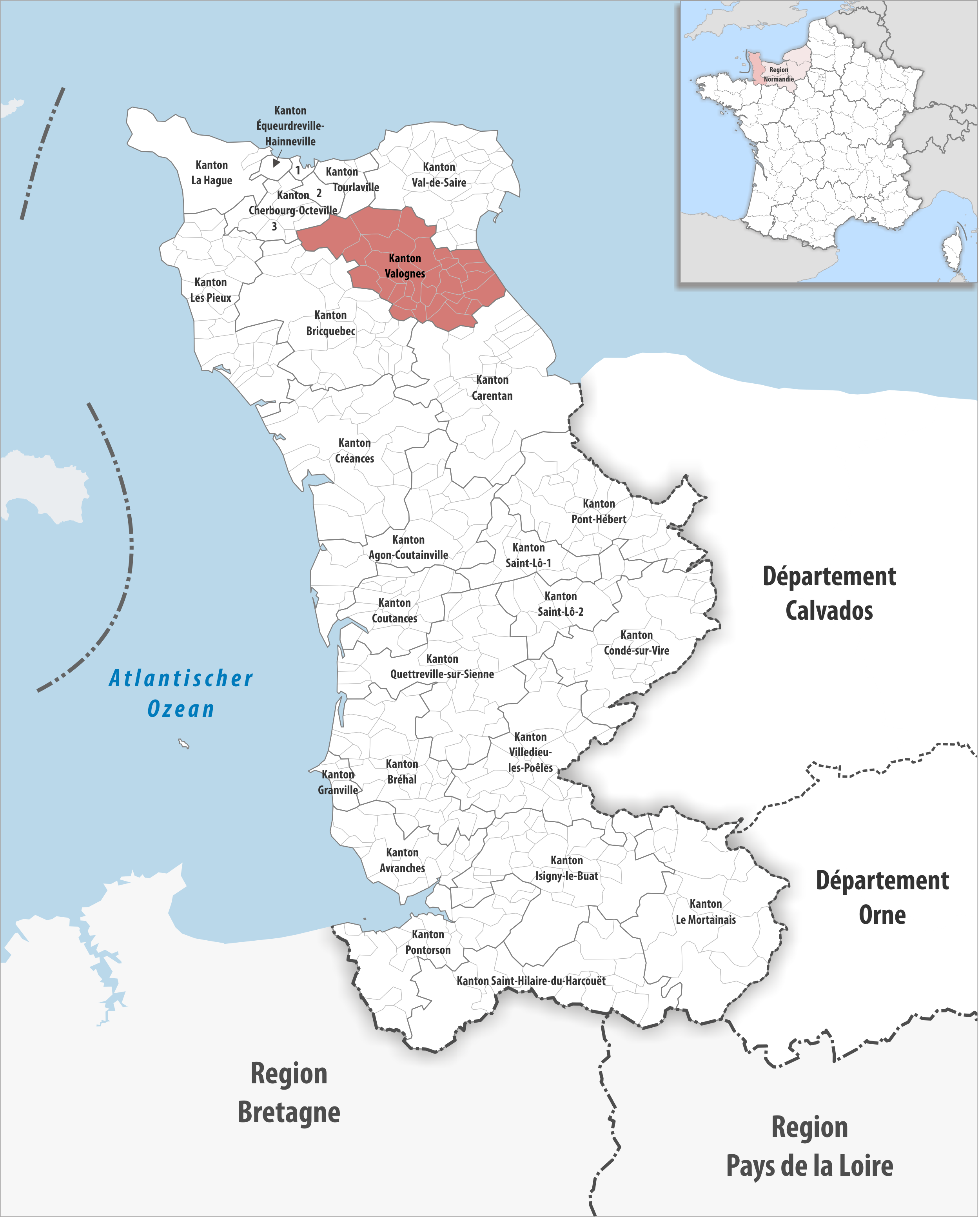 Lage des Kantons Valognes